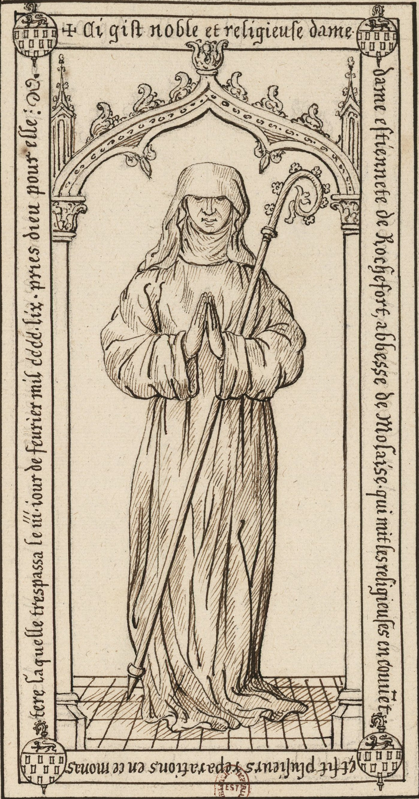 Pierre tombale sur laquelle est gravée l'effigie d'une religieuse tenant une crosse